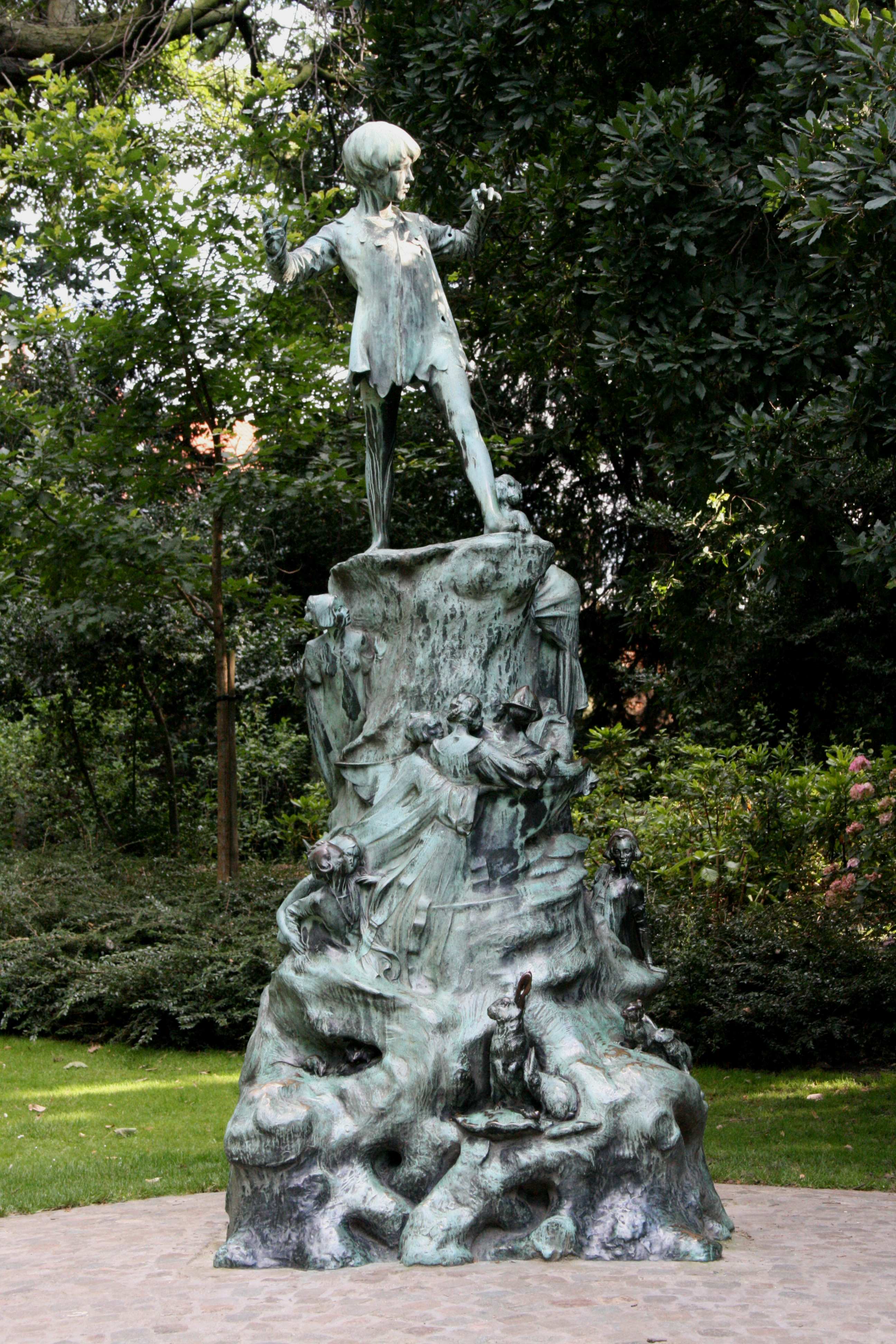 Parc d'Egmont, Bruxelles (Belgique). Statue de Peter Pan. Copie de la statue de Kensington Gardens à Londres, don du sculpteur Georges Frampton à la ville de Bruxelles